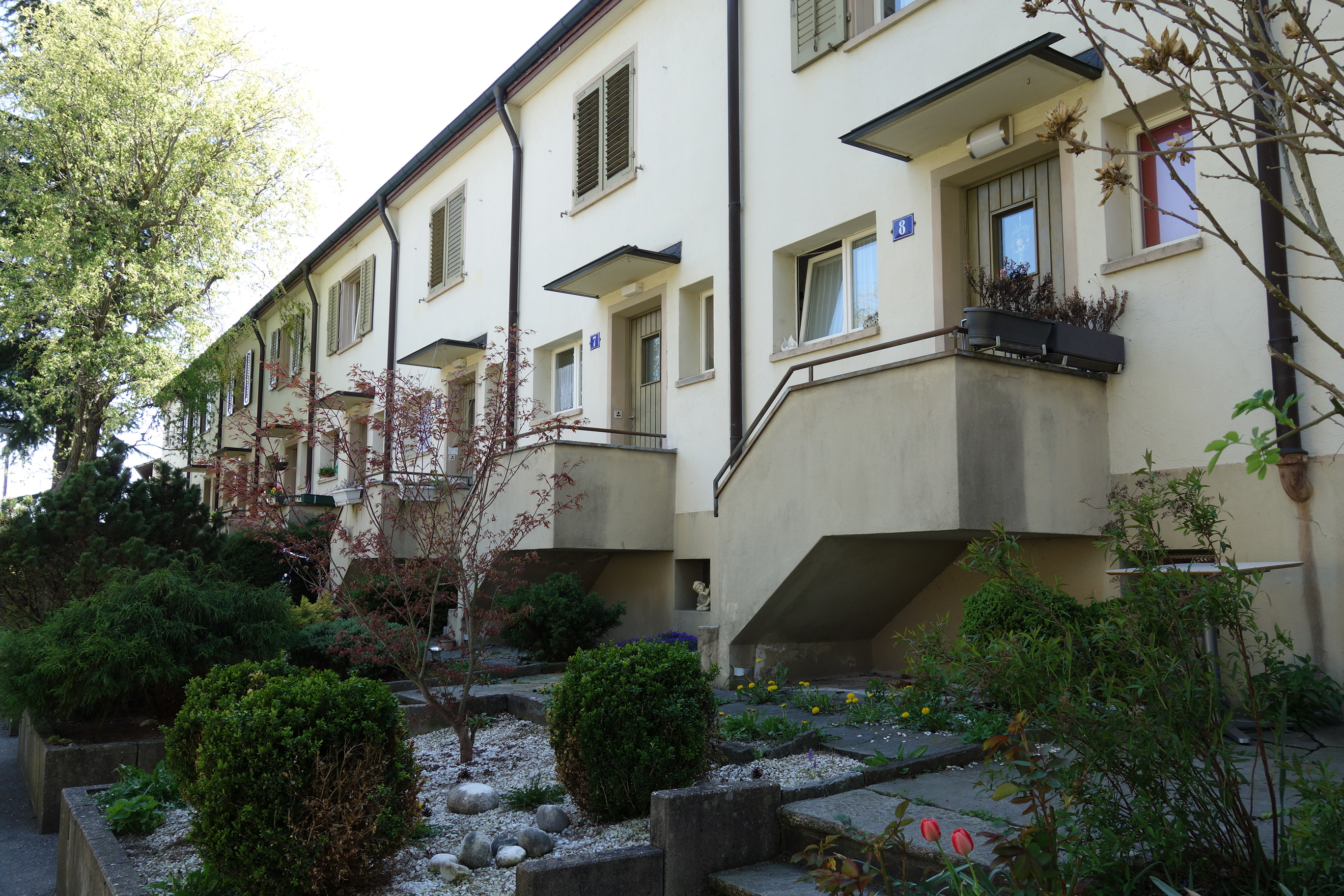 Famiienheim-Genossenschaft Zürich, Schweiz: Grossalbis